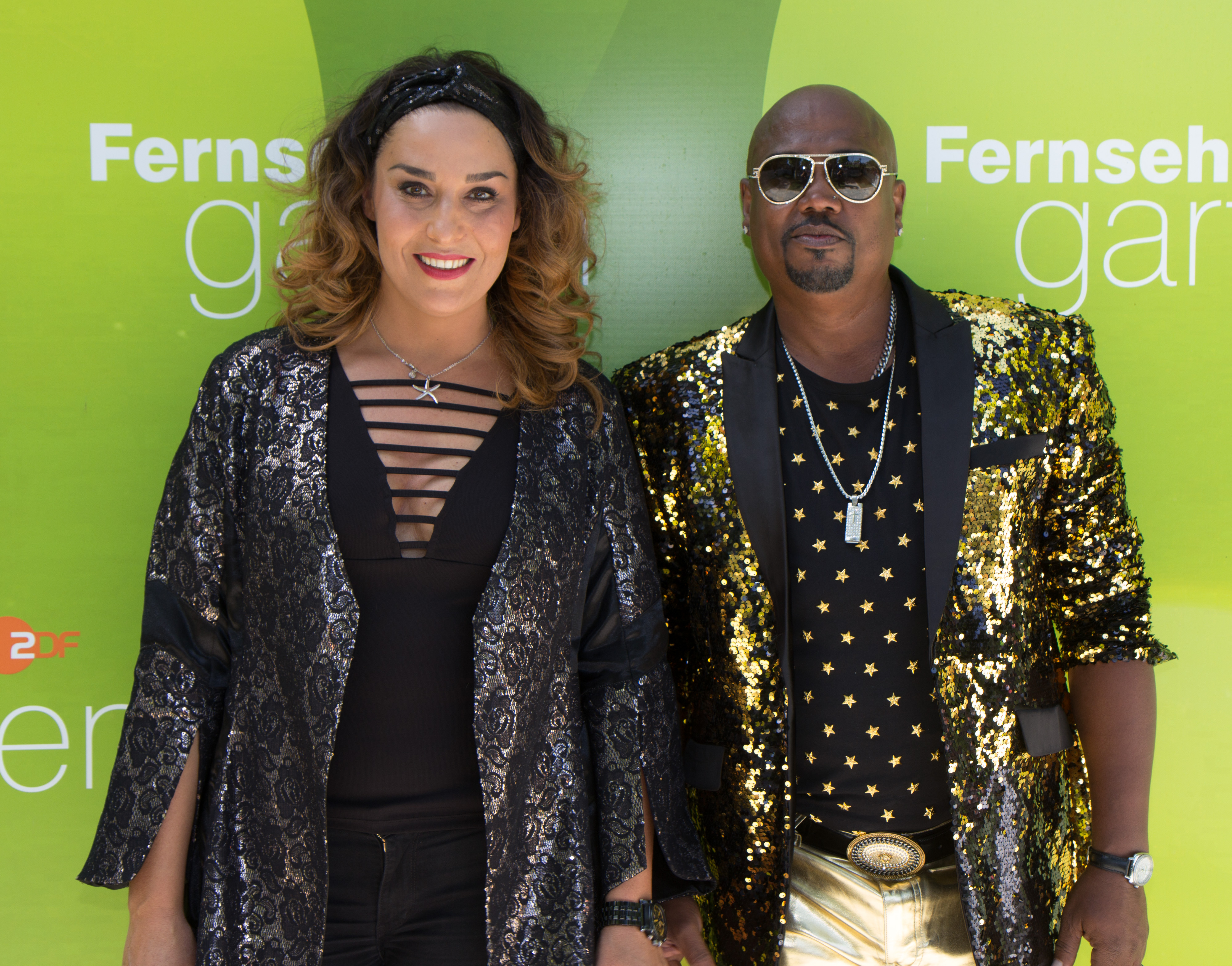 La Bouche als Gast im ZDF-Fernsehgarten am 12. August 2018 in Mainz.